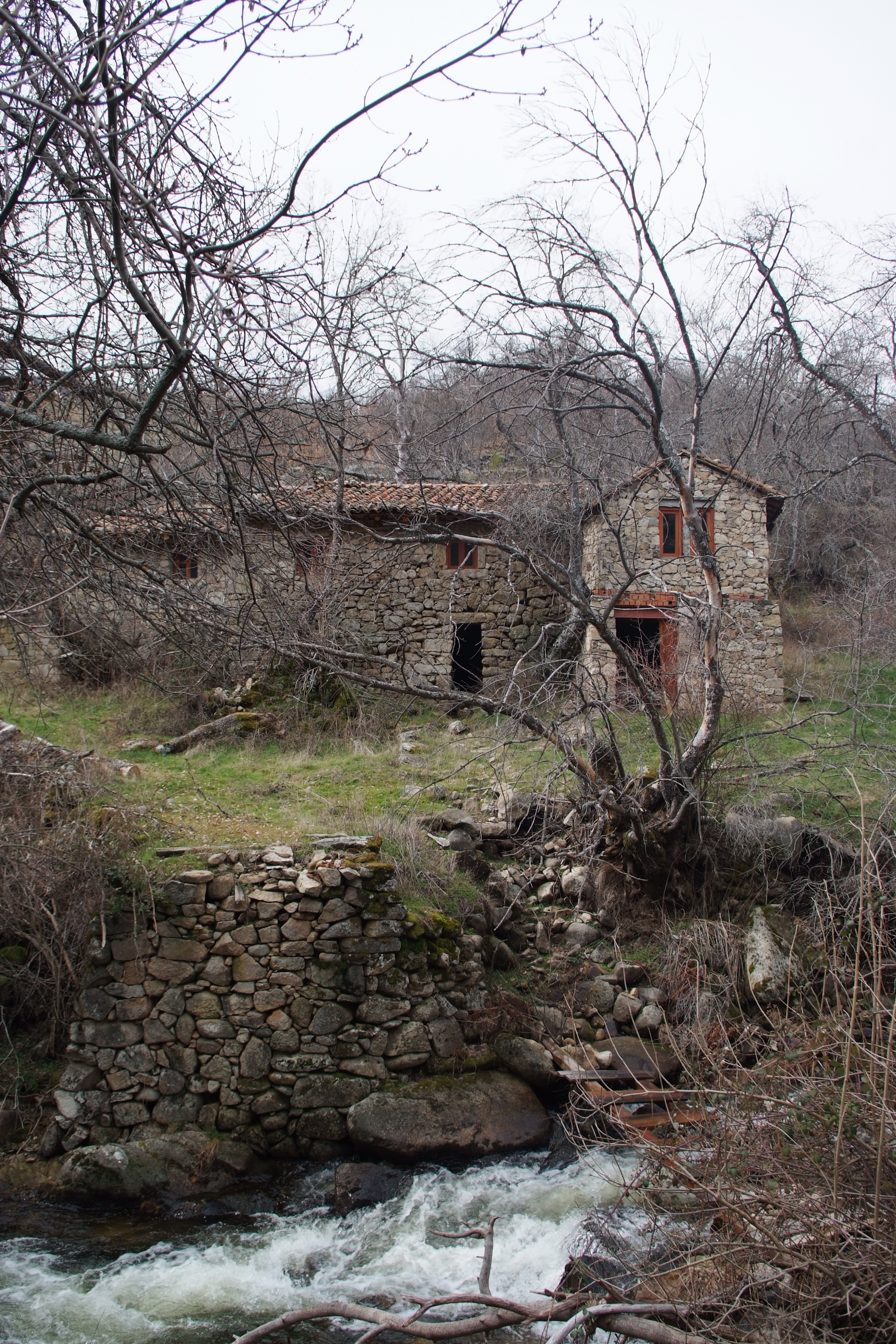 Molino en San Juan de Gredos (Ávila; España)